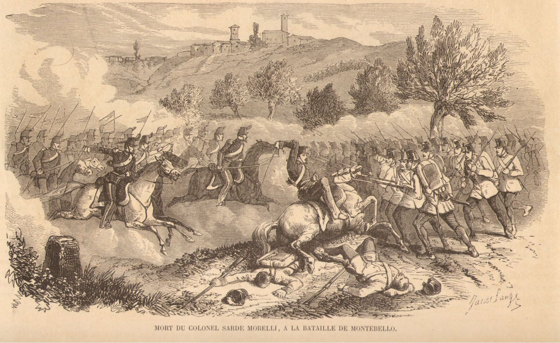 Battaglia di Montebello (1859): il colonnello piemontese Tommaso Morelli di Popolo (1814-1859) viene ferito a morte (al centro).